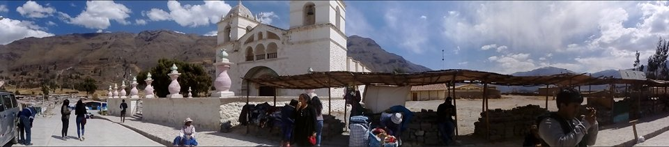 Se aprecia el templo de Santa Ana así como los comerciantes de textiles y recuerdos de la sierra de Arequípa